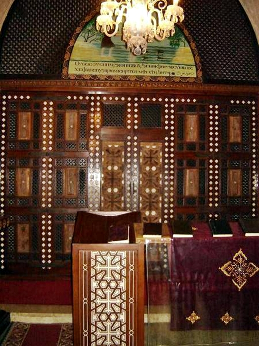 حجاب كنيسة الانبا مقار، دير الانبا مقار، وادي النطرون